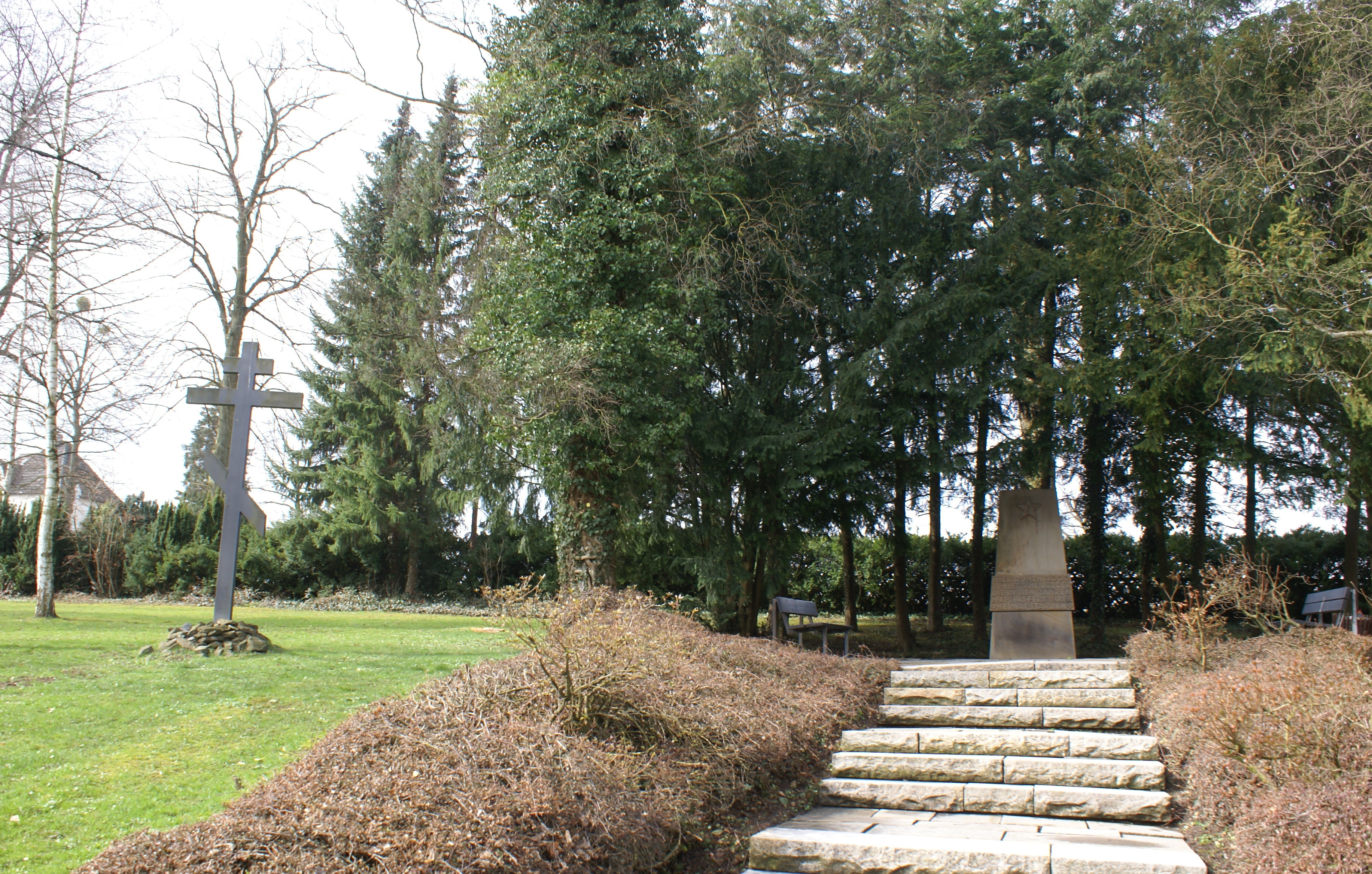 Kriegsfriedhof Höcklingser Weg des Stammlagers VI A in Hemer